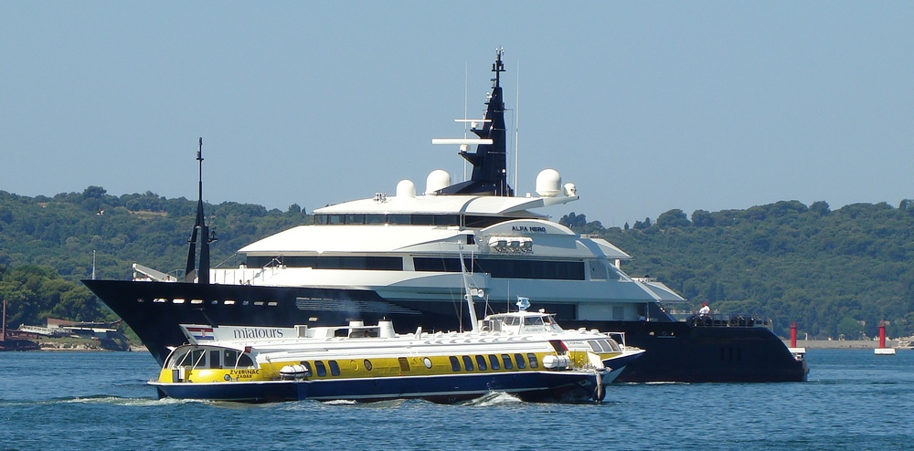 Hidrogliser Žverinac i jahta Alfa Nero u pulskoj luci